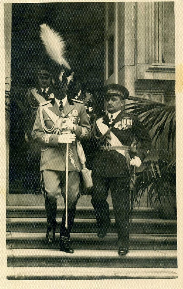 Il Principe Umberto alla festa di corpo dei Granatieri di Sardegna